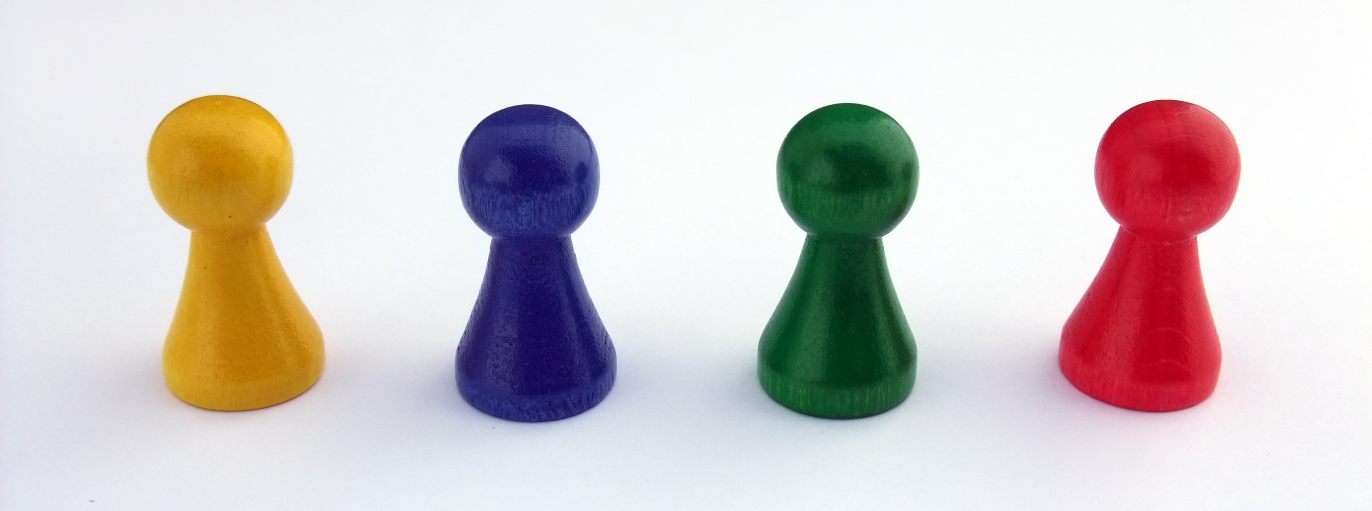 Spielstein